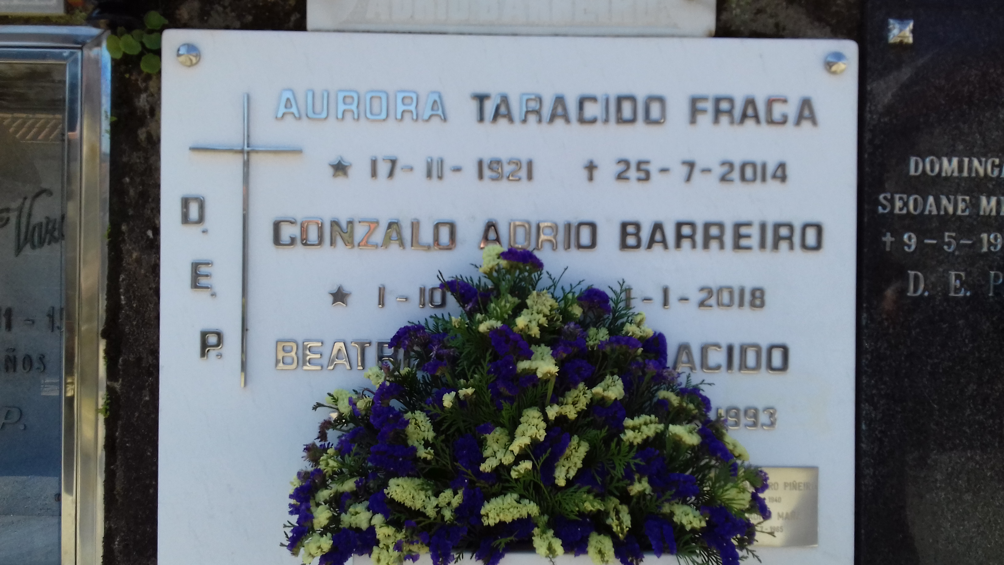 Lápida de Aurora Taracido Fraga, Gonzalo Adrio Barreiro e Beatriz Adrio Taracido